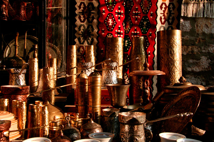 Ba??ar?ija Market Sarajevo